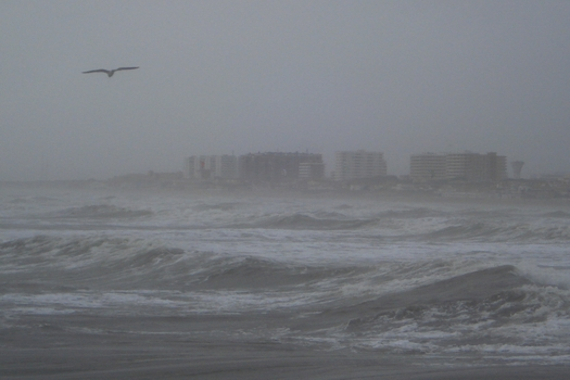 Punta Umbria.